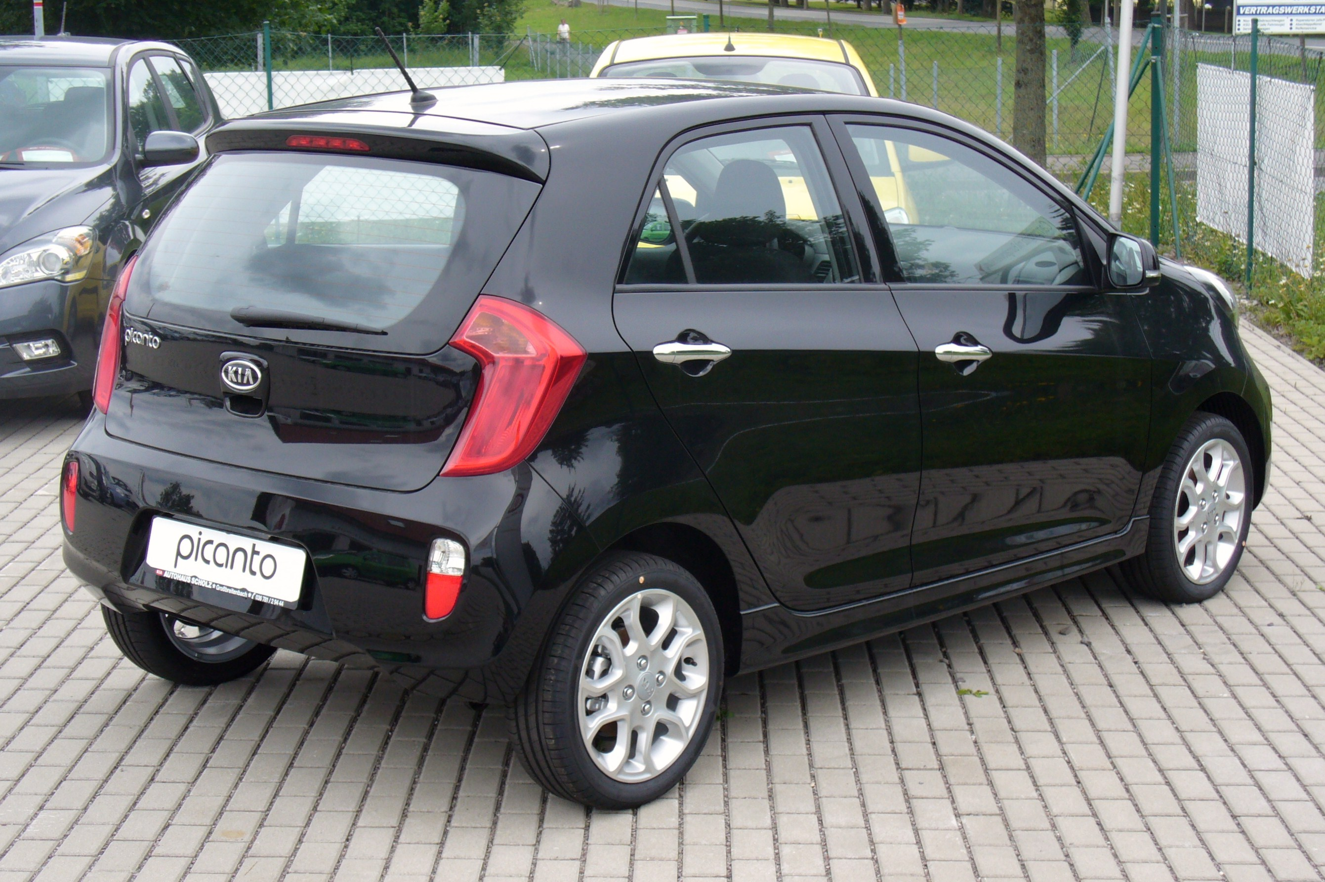 Kia Picanto